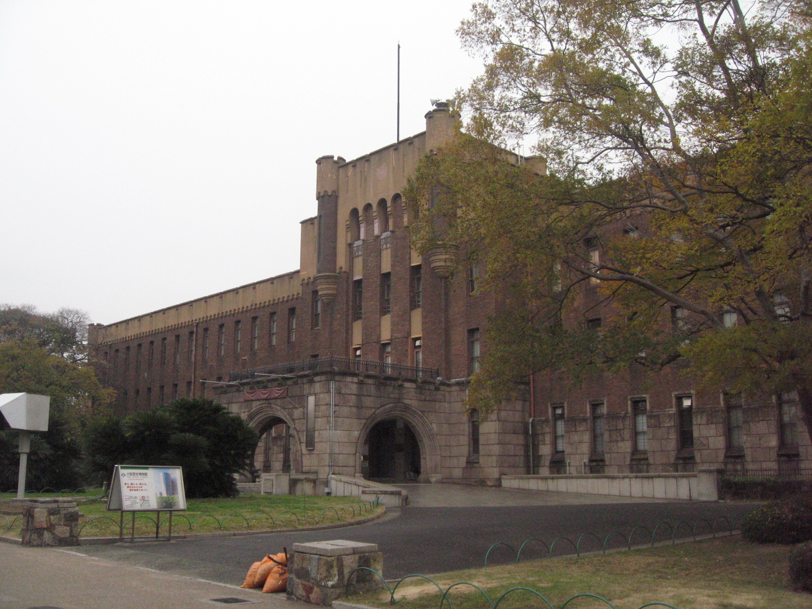 Osaka Castle, Osaka, Kansai Region.